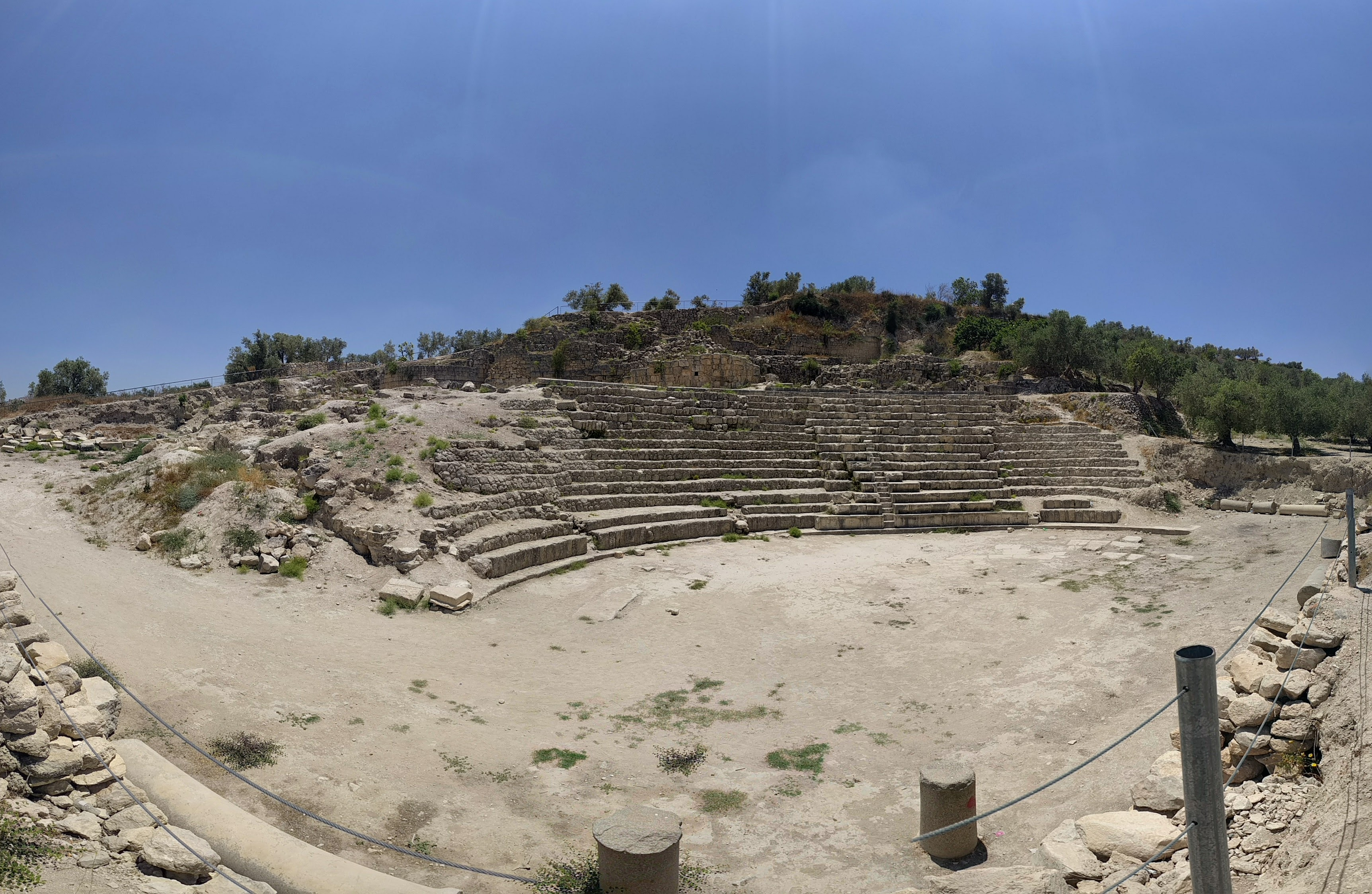 תמונה פנורמית של התיאטרון הרומי של סבסטיה.